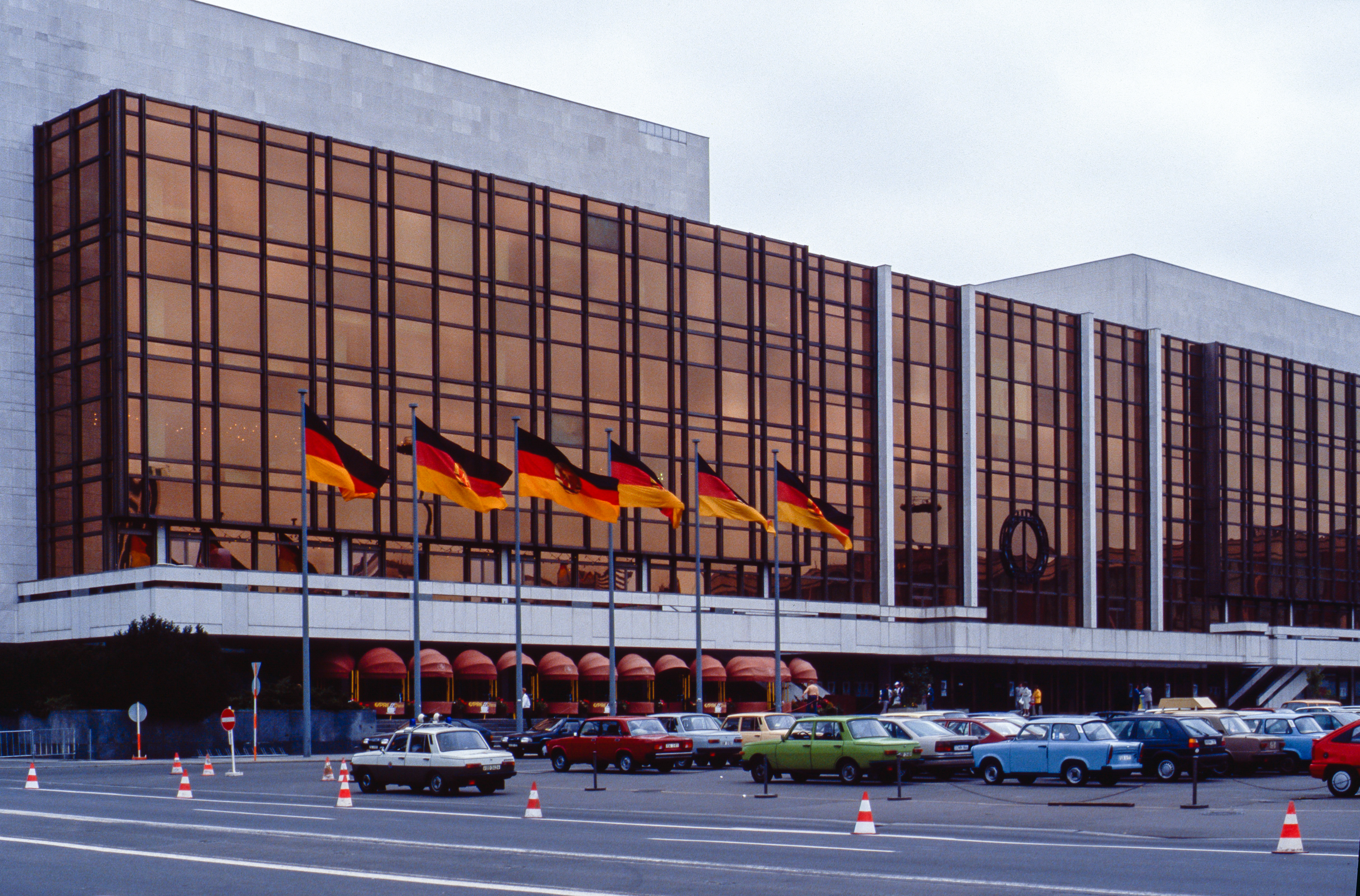 Berlin, Palast der Republik (wahrscheinlich um 1990)